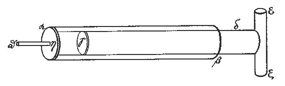 schema einer pumpe